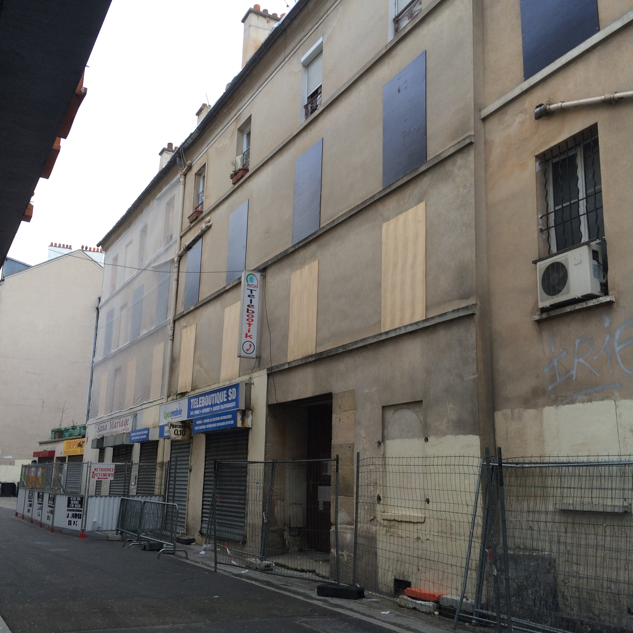 L'immeuble du 48 rue du Corbillon six mois après l'opération policière du 18 novembre 2015.